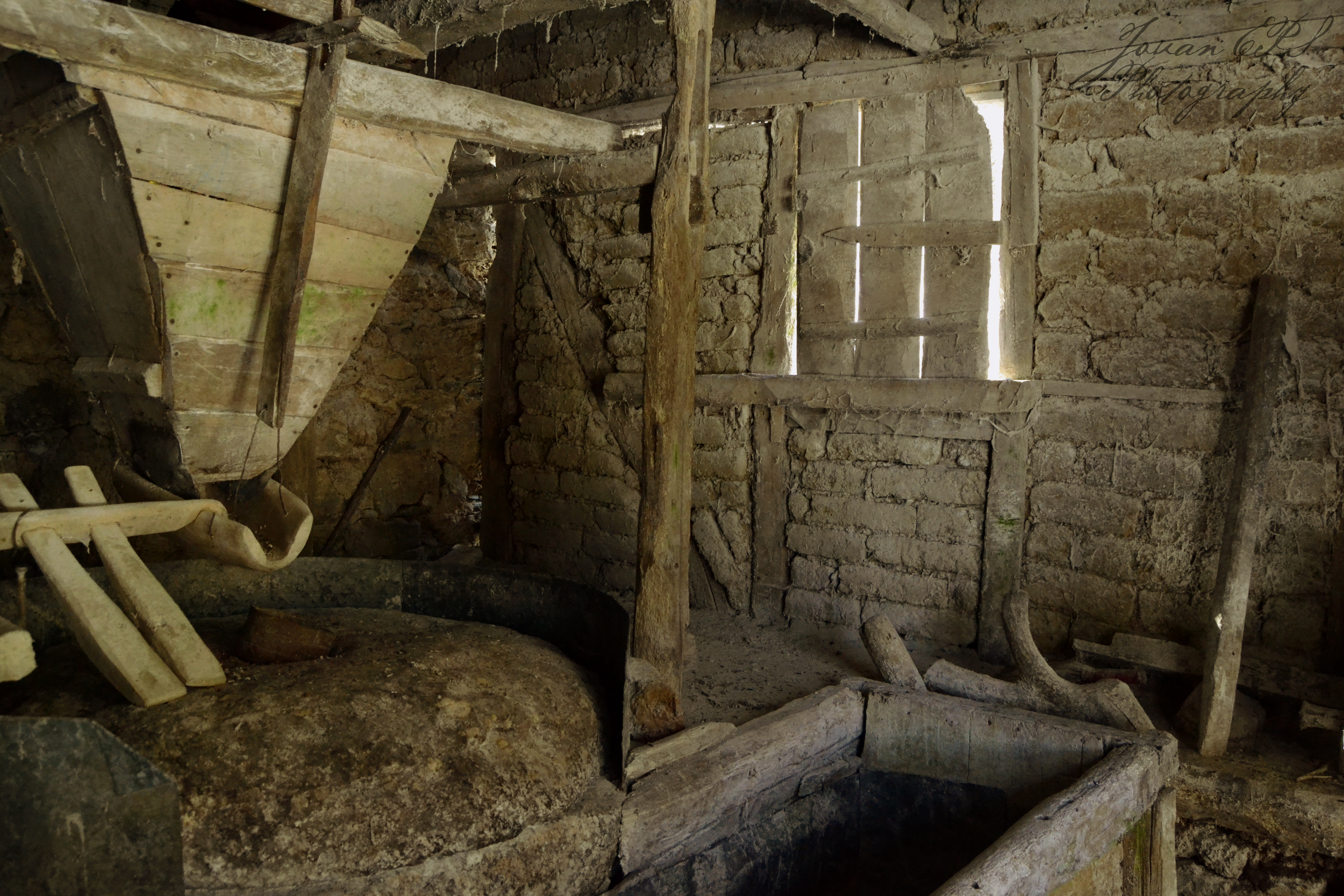 Внатрешност на стара воденица (детали од тркалото на воденицата) Село Свињишта - Кичево